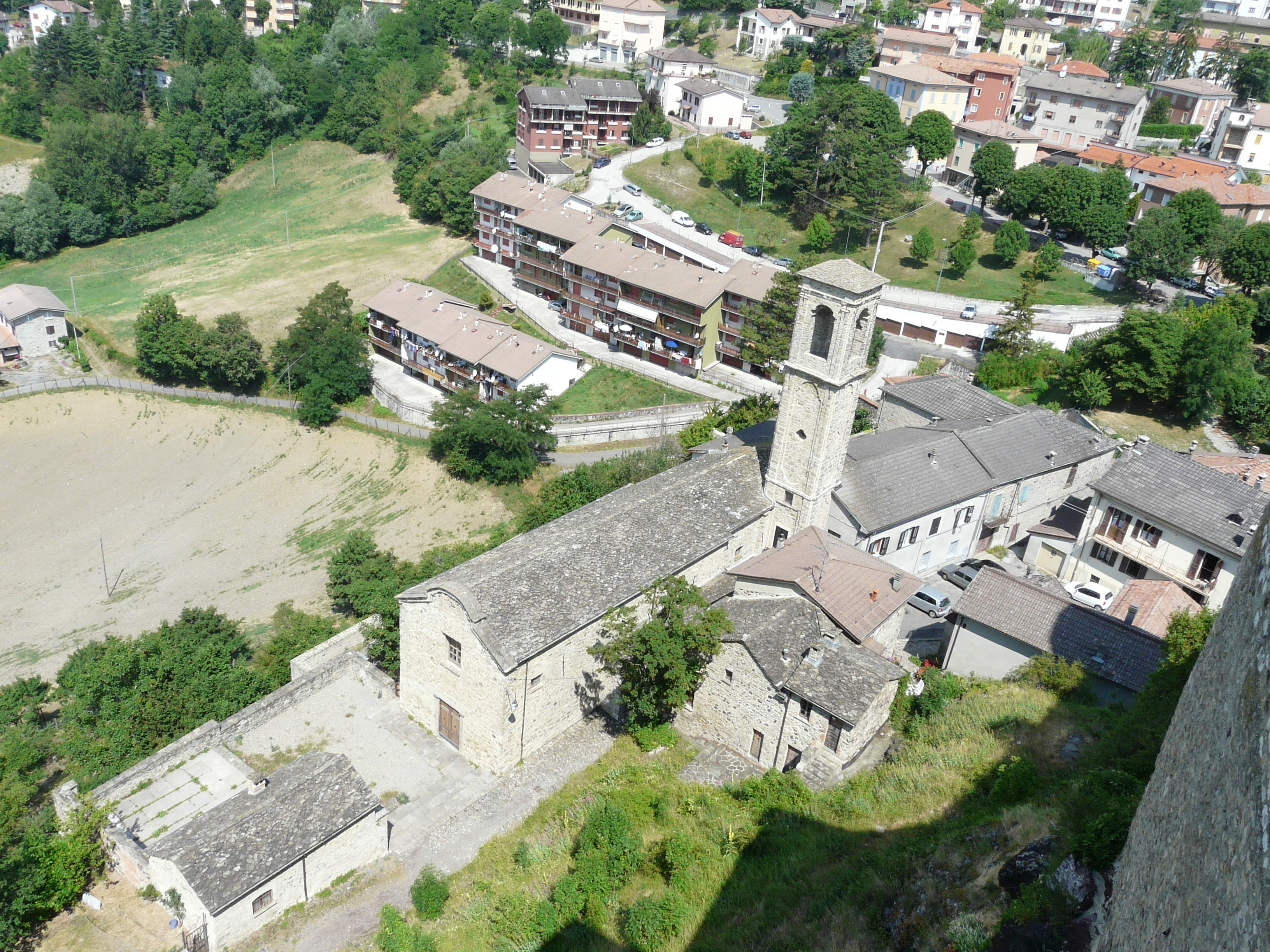 Chiesa di San Francesco di Bardi, Emilia-Romagna, Italia